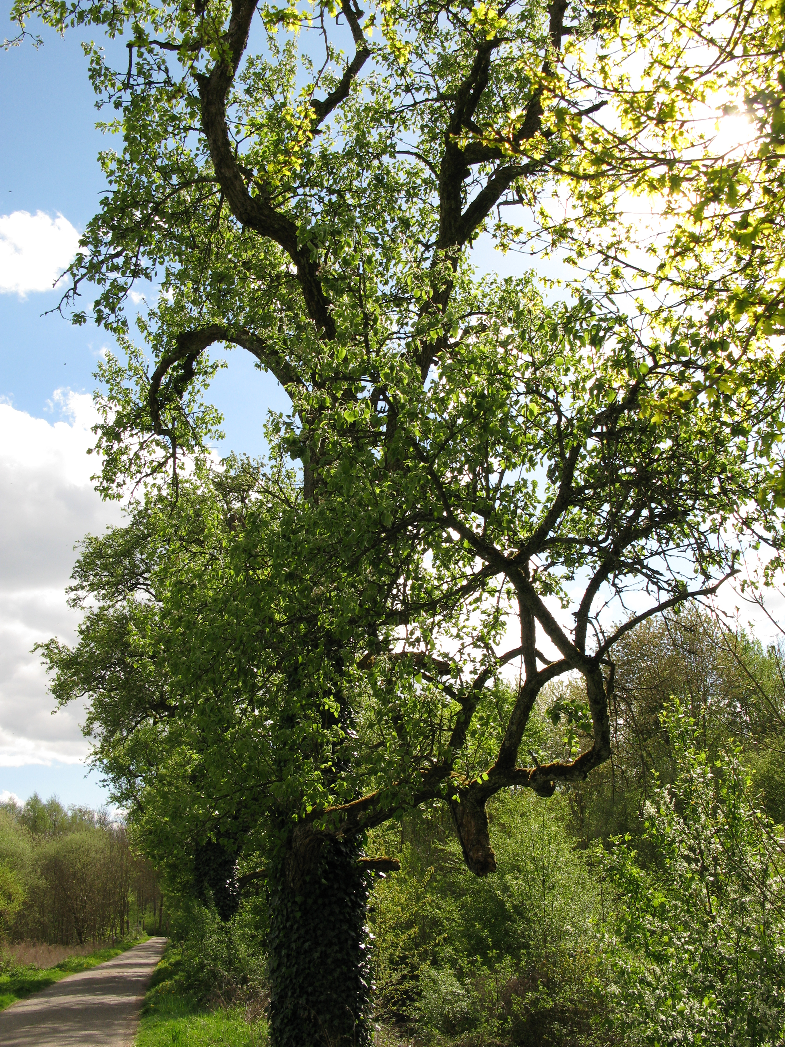 Im Naturschutzgebiet Freiburger Rieselfeld im Stadtkreis Freiburg im Breisgau in Baden-Württemberg.